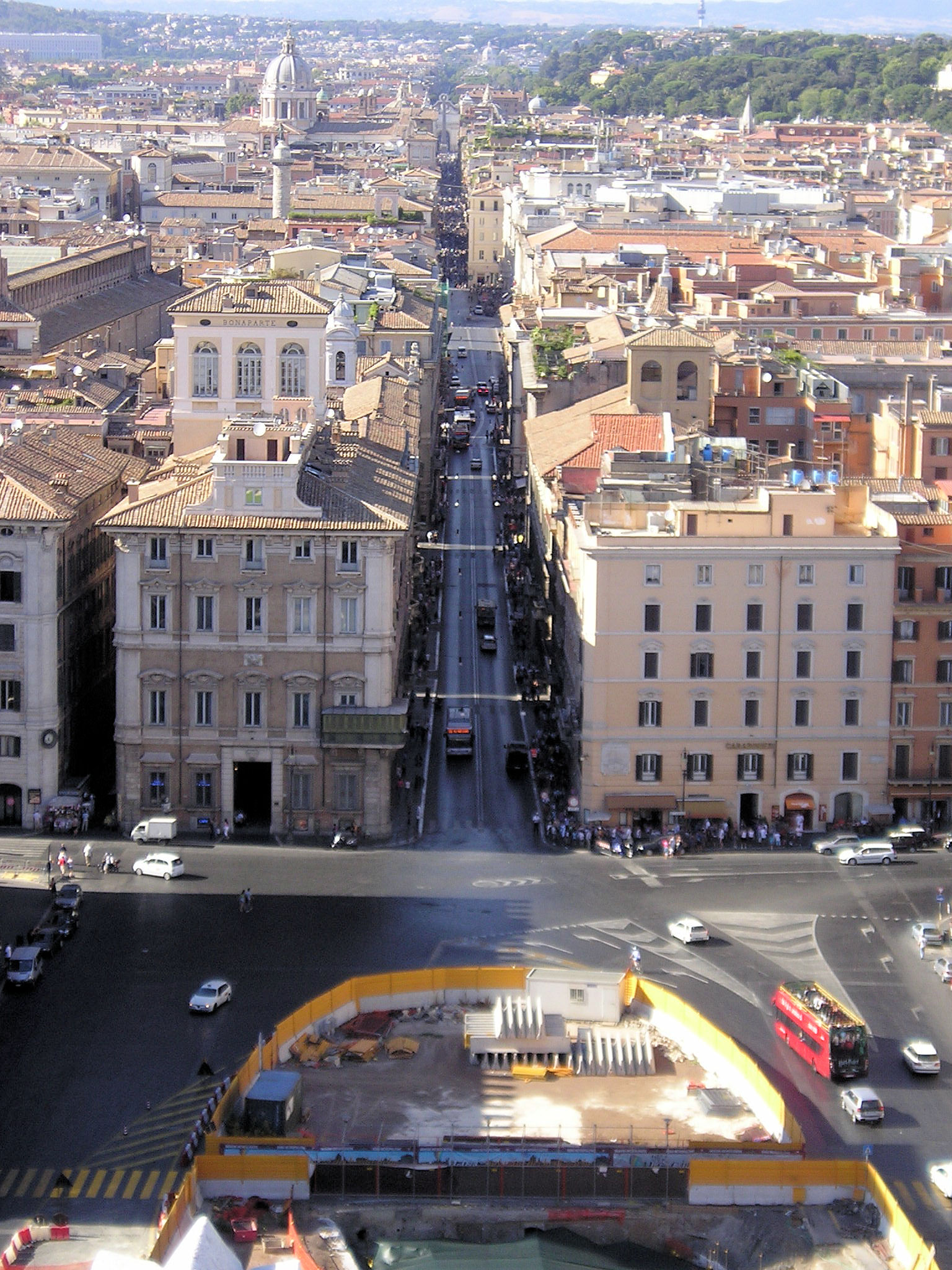 Via del Corso, Roma, on the left sideː Palazzo Bonaparte